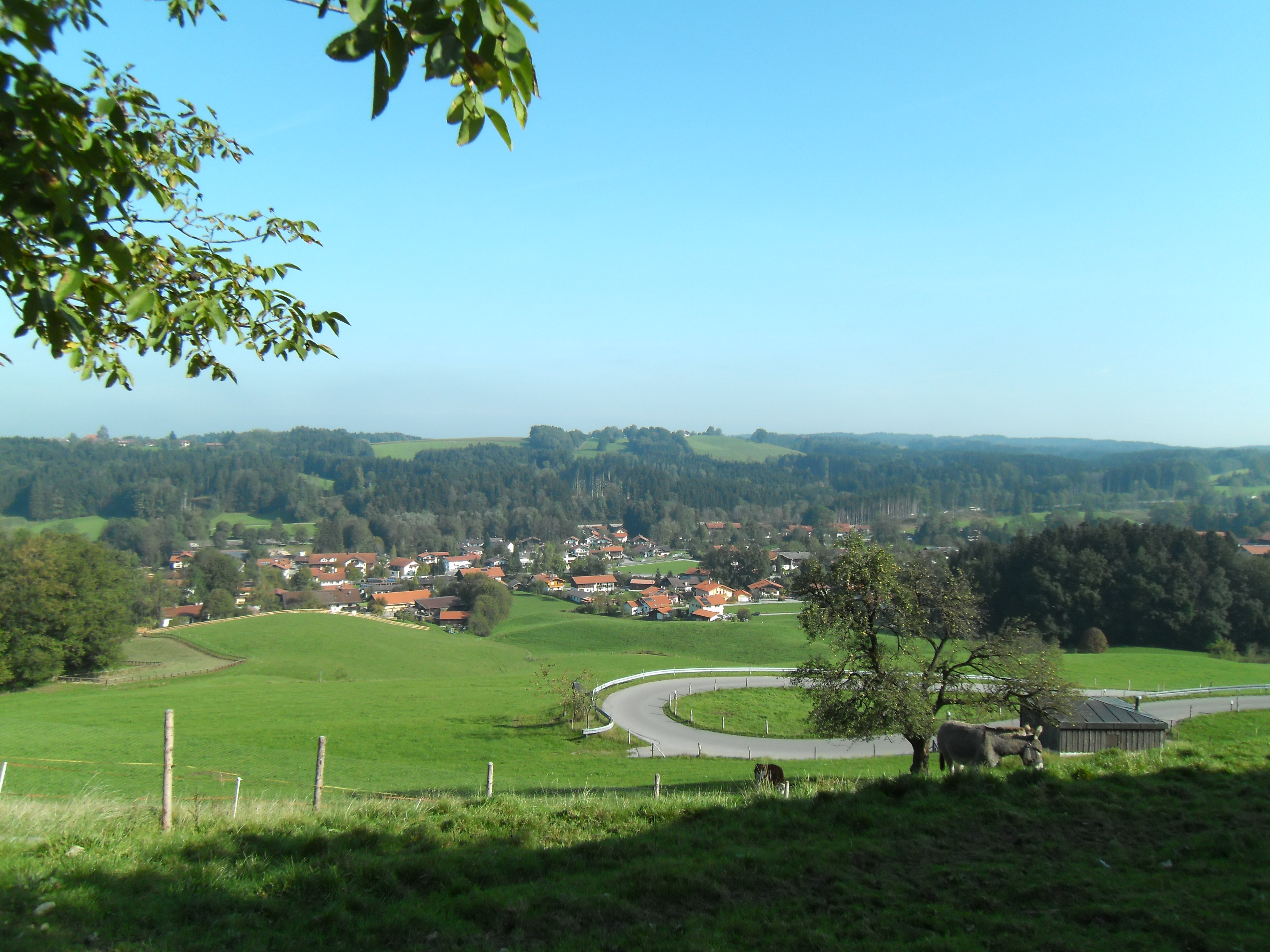 Rohrdorf (am Inn), Landkreis Rosenheim, Oberbayern. Das Bild zeigt den Gemeindeteil Achenmühle (vom Osthang des Samerbergs aus gesehen).